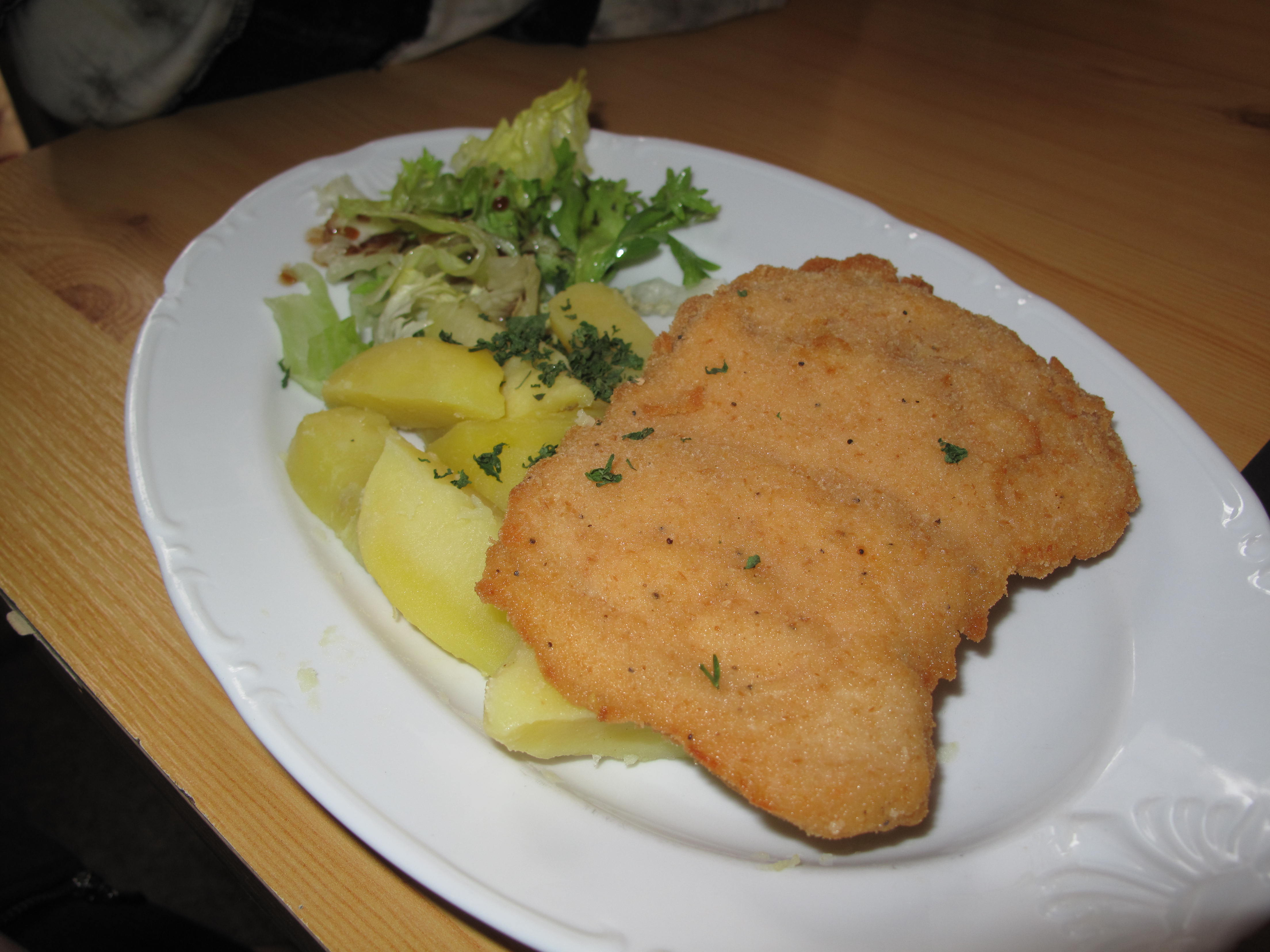 smažený řízek, brambory